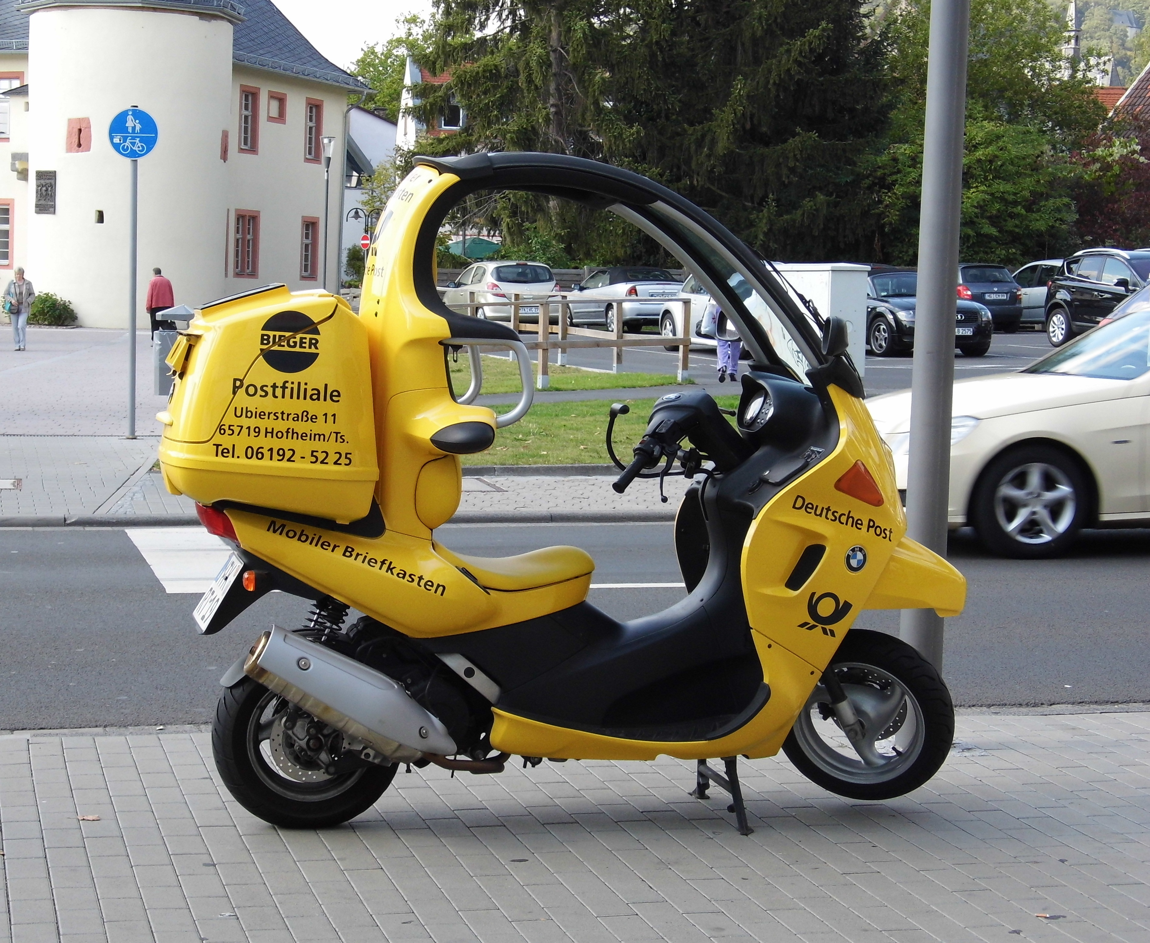 Dieser „mobile Briefkasten“ wird seit 2011 von einer Postagentur in Hofheim betrieben. Es handelt sich um einen umgebauten C1-Roller von BMW. Er ist in Postgelb lackiert und hat eine offizielle Zulassung der Post als Briefkasten.